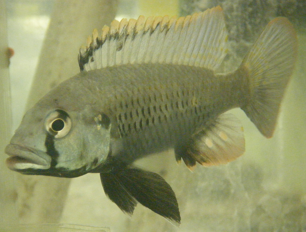 Astatotilapia sp. "Chizumulu", G1 (lab bred) male - Chizumulu population